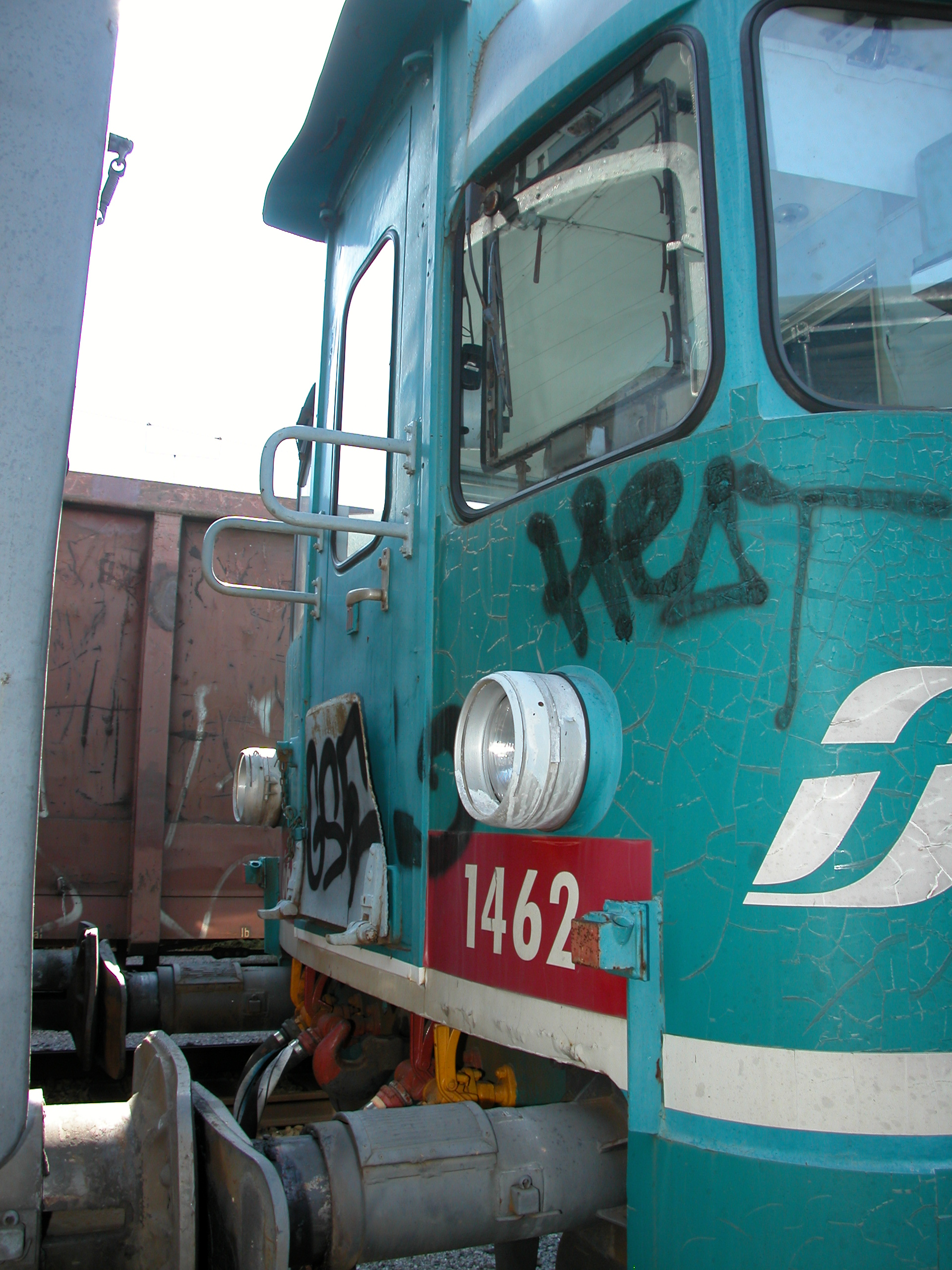 Il frontale lato cabina posteriore dell'automotrice ALn 668.1462. A parte il differente schema di coloritura e qualche dettaglio, la rimozione del mantice ha riportato il passaggio di intercomunicazione all'aspetto originario.